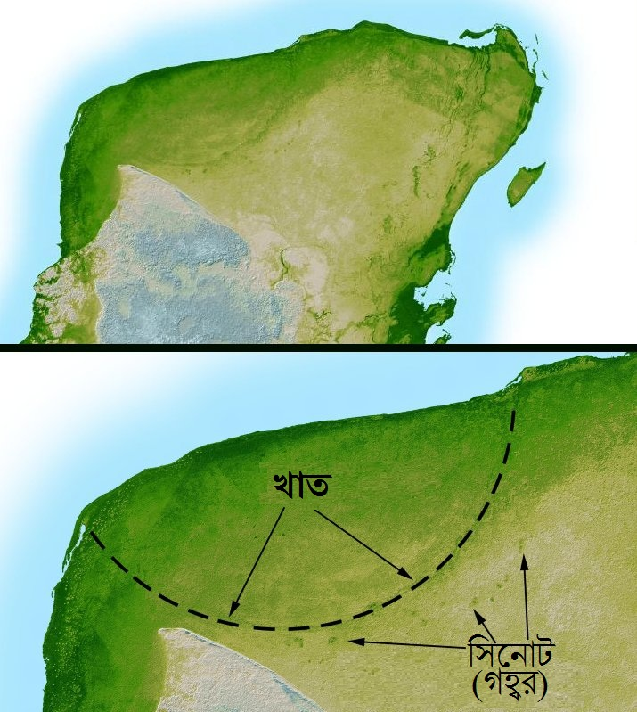 মেক্সিকোর চিক্সুলাব উল্‌কাখাতের এই রেডার চিত্রে খাতটির হালকা কিন্তু স্পষ্ট চিহ্ন ধরা পড়েছে। অধিকাংশ বিজ্ঞানী আজ একমত যে সাড়ে ৬ কোটি বছর আগে এই খাত সৃষ্টিকারী উল্‌কার আঘাত পৃথিবী থেকে ডাইনোসর এবং আরও অনেক জীবের অবলুপ্তির প্রত্যক্ষ কারণ।